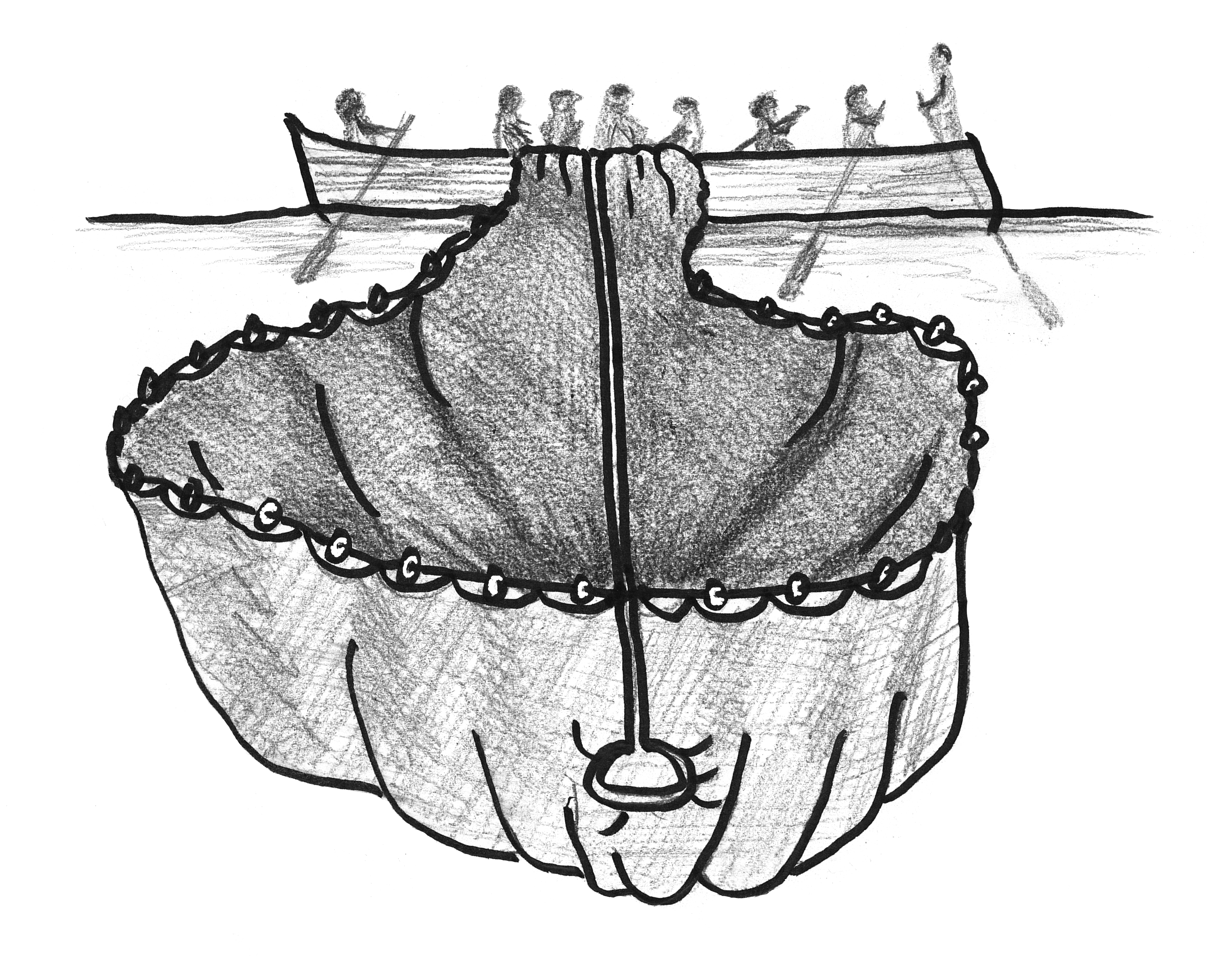 Bolintx